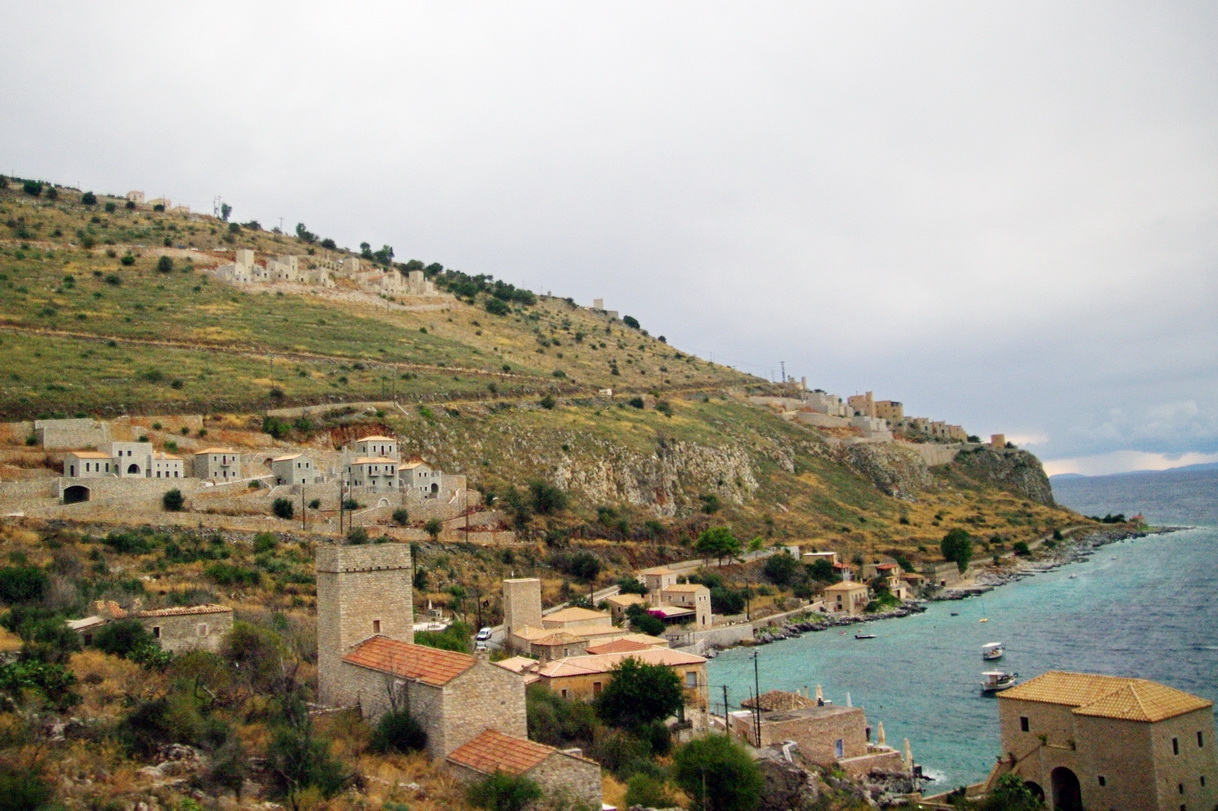 Limeni-Bucht, Itylo, Innere Mani